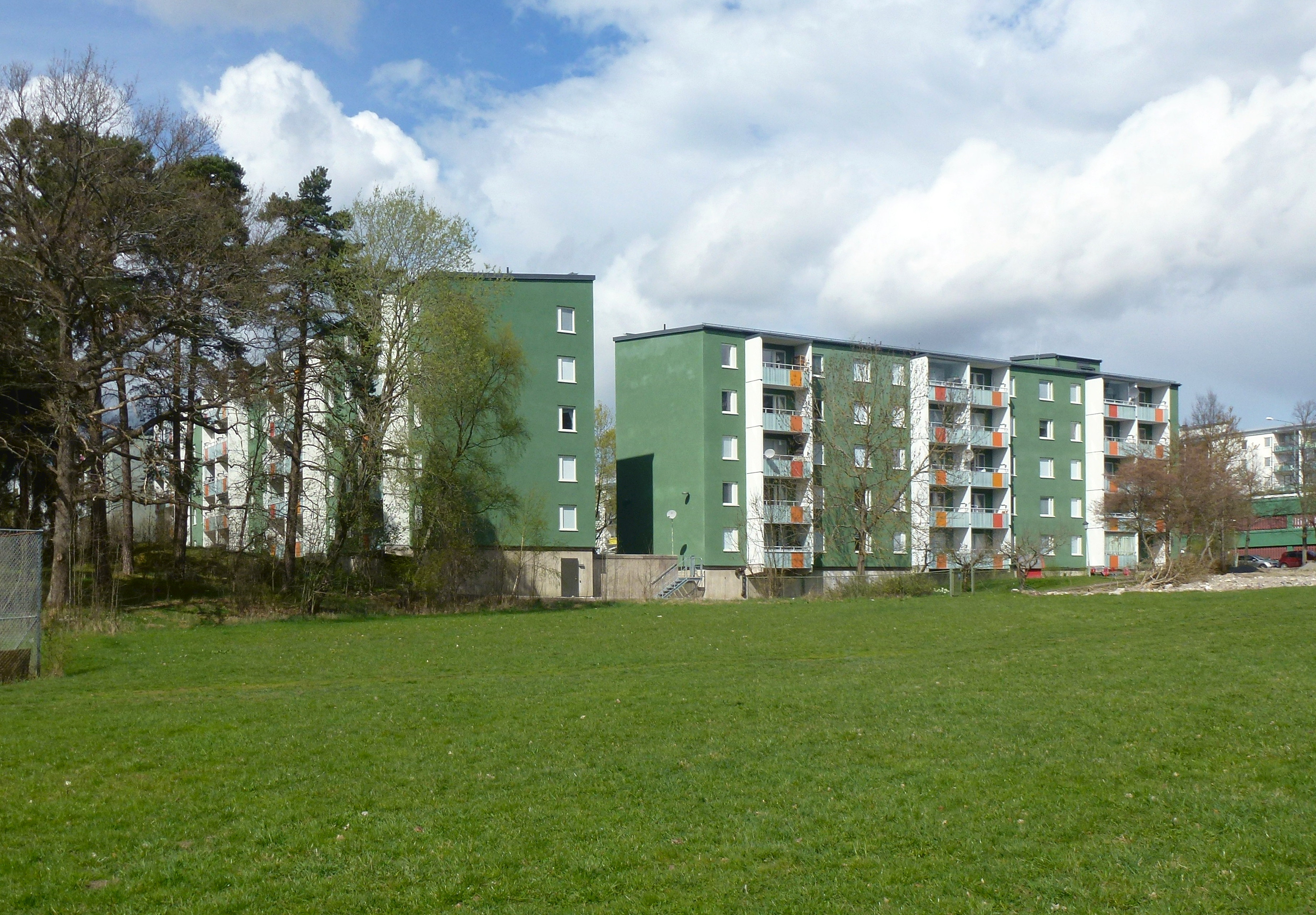 1970-tals bebyggelse i Husby, Stockholm